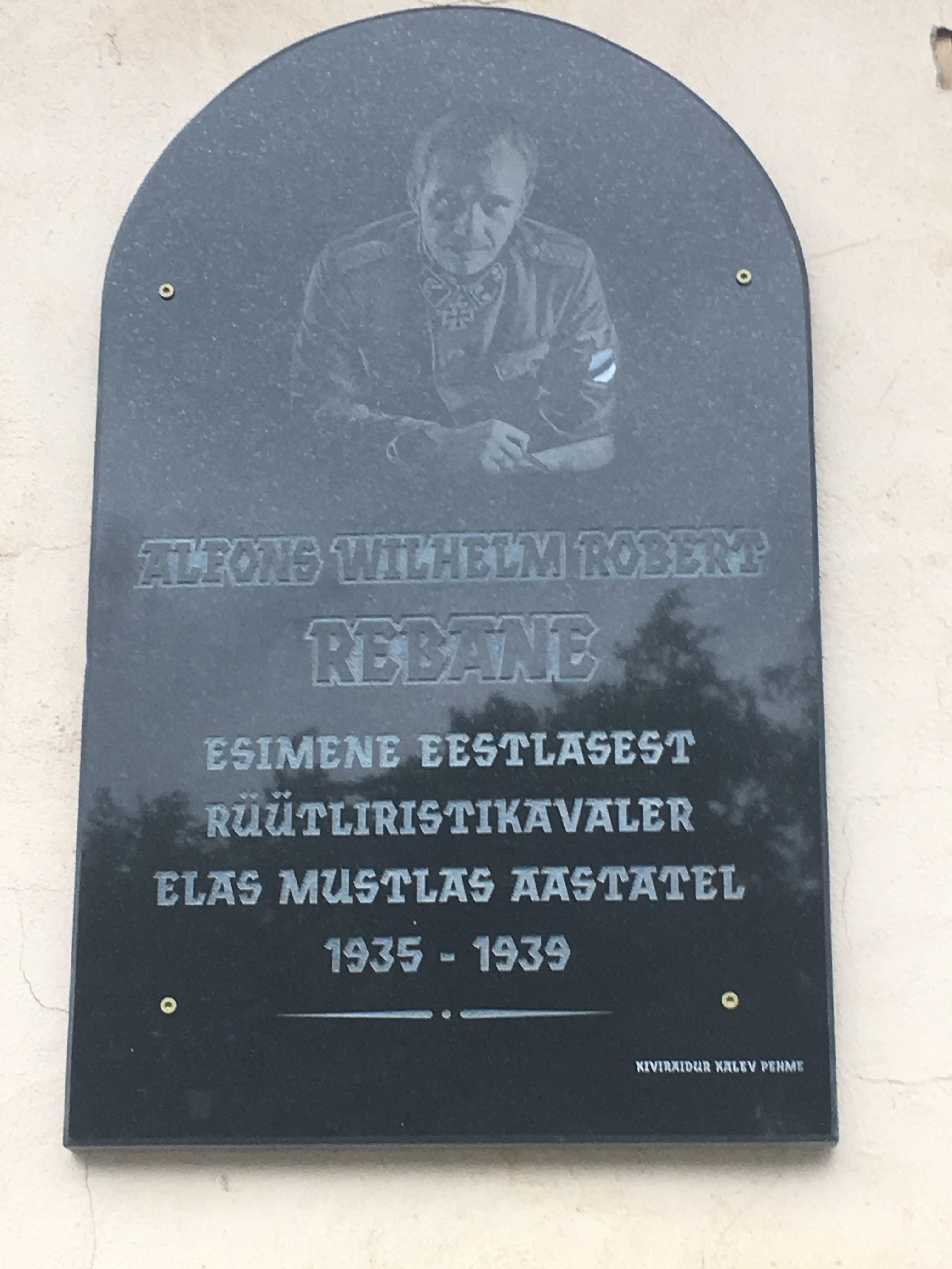 Alfons Rebase mälestuskivi Mustlas